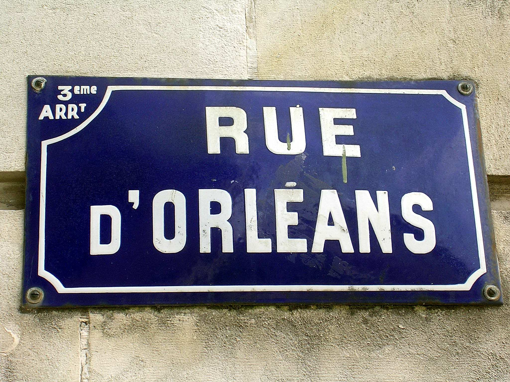 Rue d'Orléans, à Nantes